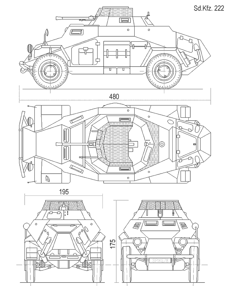 Sd.Kfz. 222 Leichter Panzerspähwagen - rzuty